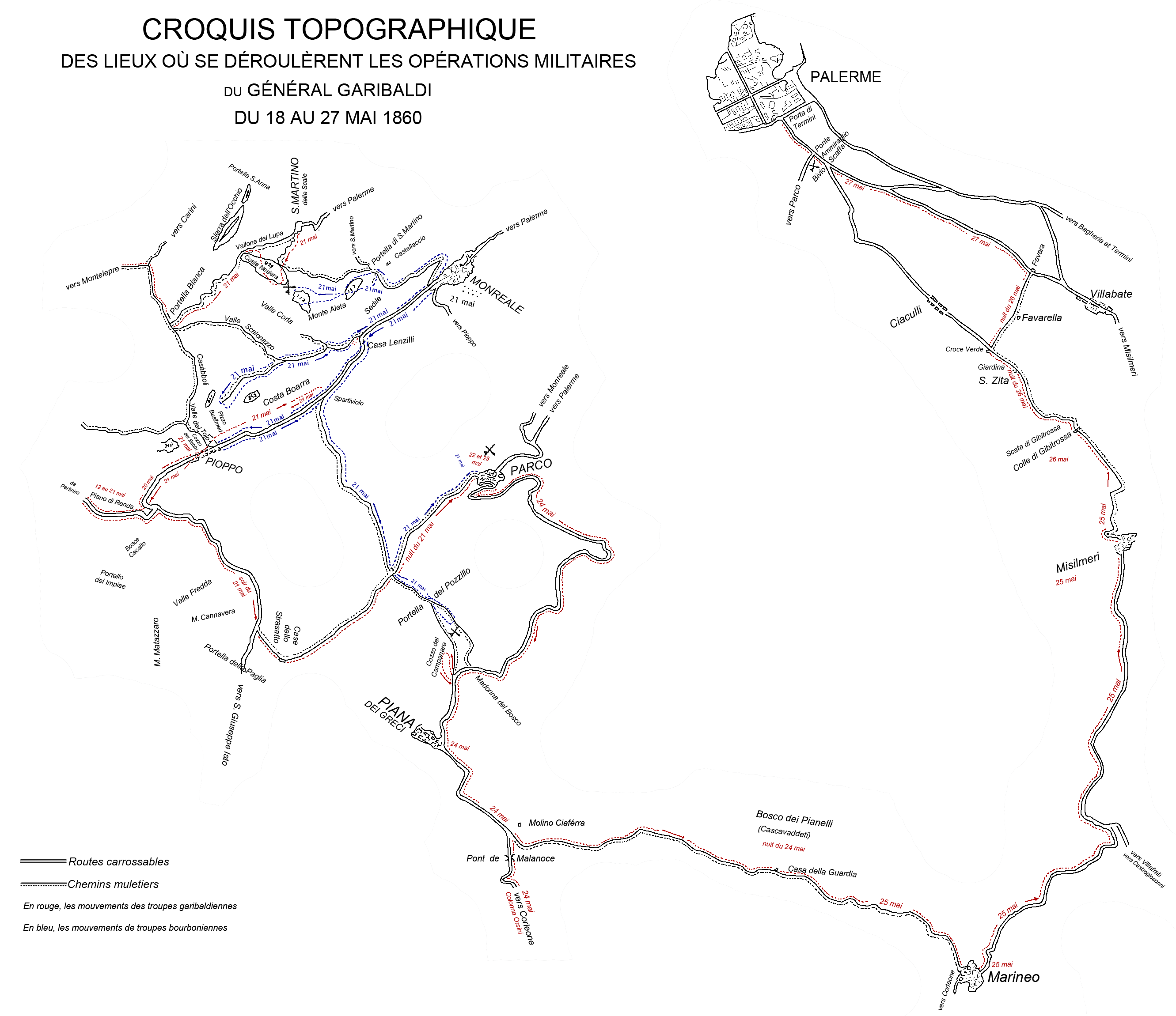 Croquis topographique des lieux où se déroulèrent les opérations militaires du Général Garibaldi du 18 au 27 mai 1860.